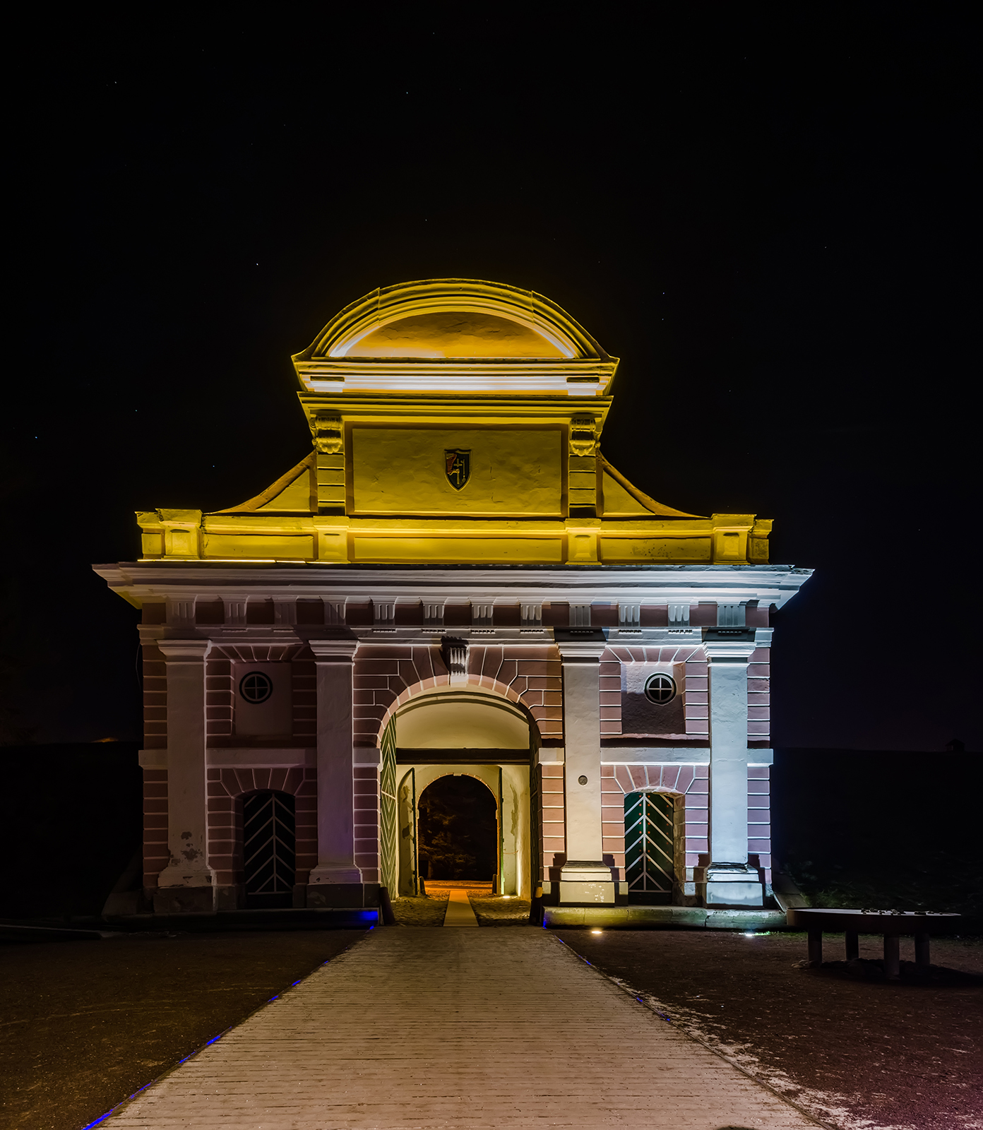 Tallinna värav Pärnus